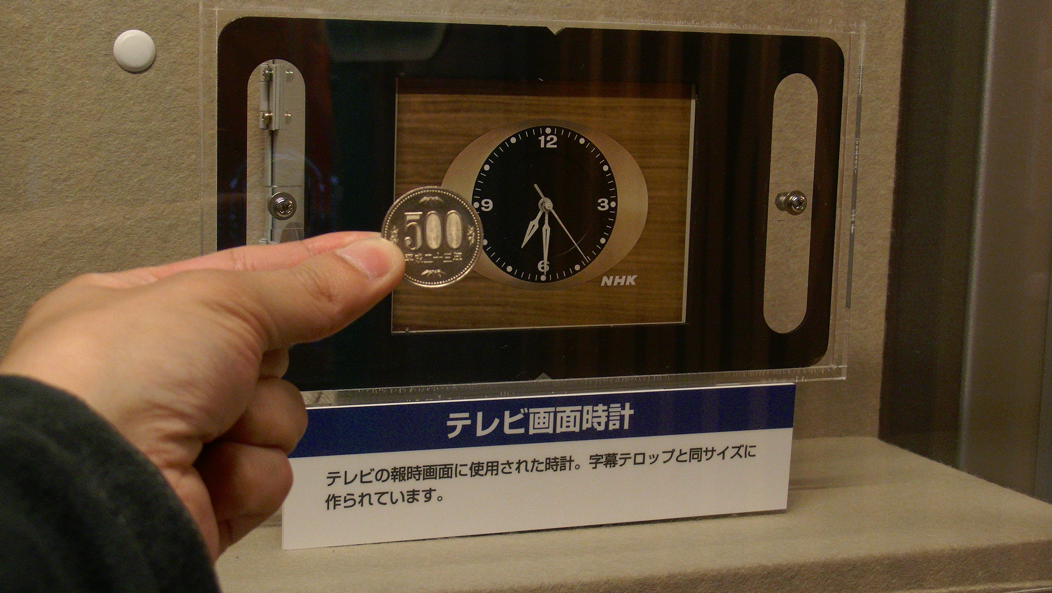 NHK放送博物館、テレビの報時画面に使用された時計。字幕テロップと同サイズに作られています。